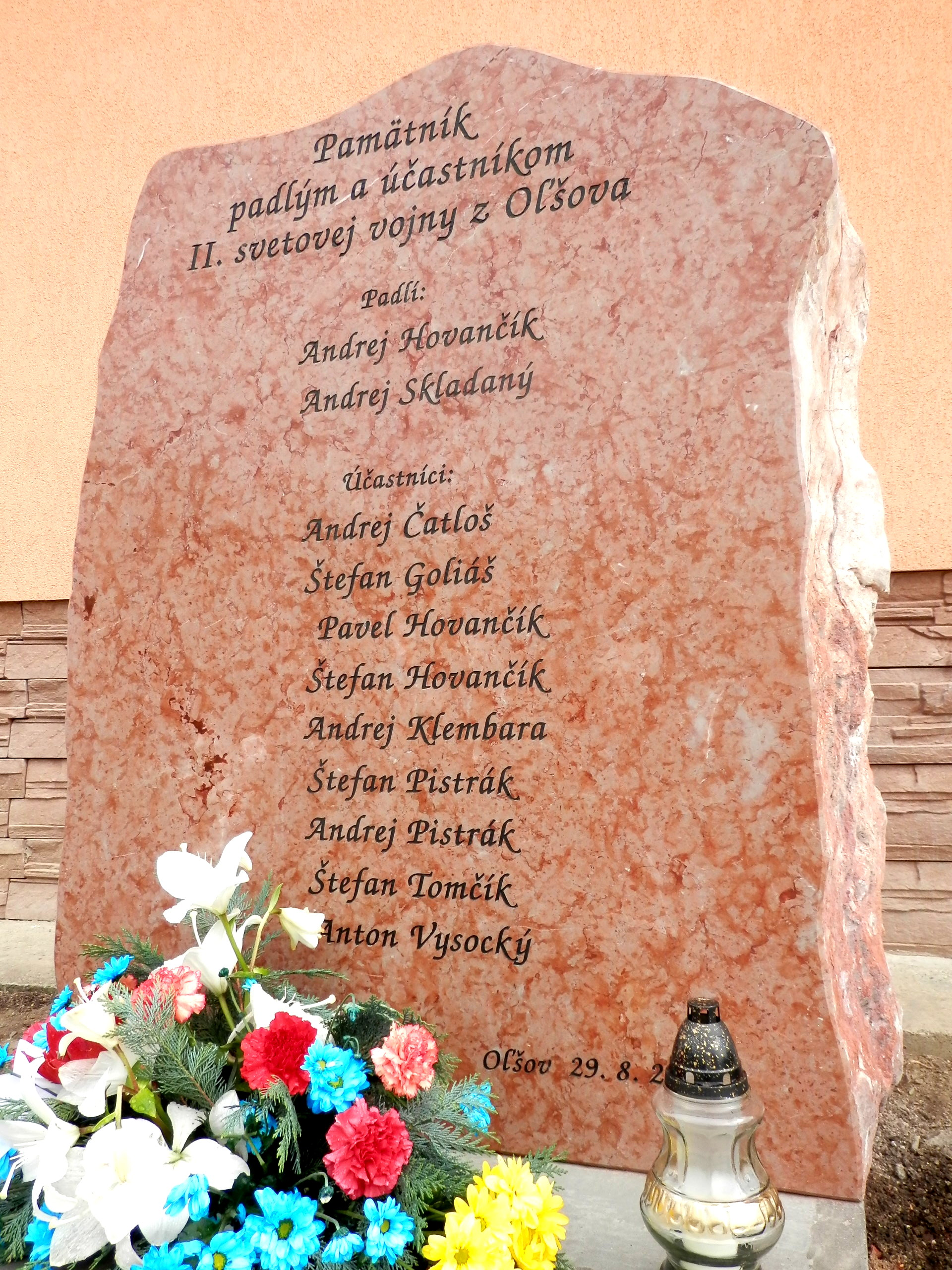 Pamätník padlým a účastníkom Druhej svetovej vojny pred budovou miestnej školy, Obec Oľšov, Okres Sabinov.